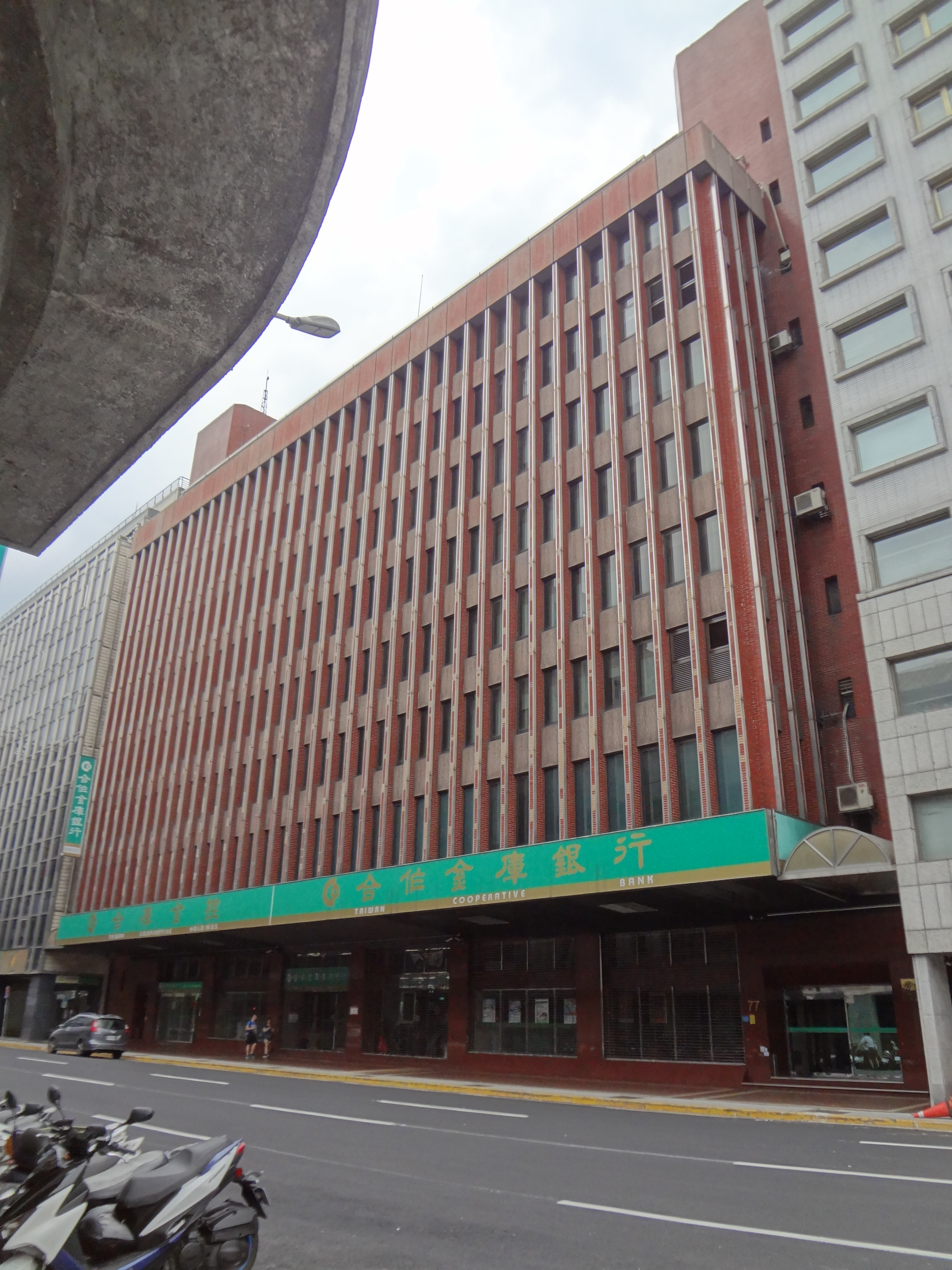 臺灣省合作金庫大樓，位於臺北市中正區館前路77號，為合作金庫銀行館前分行與中華民國勞動部所在地。